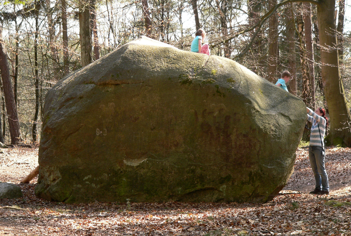 Giebichenstein